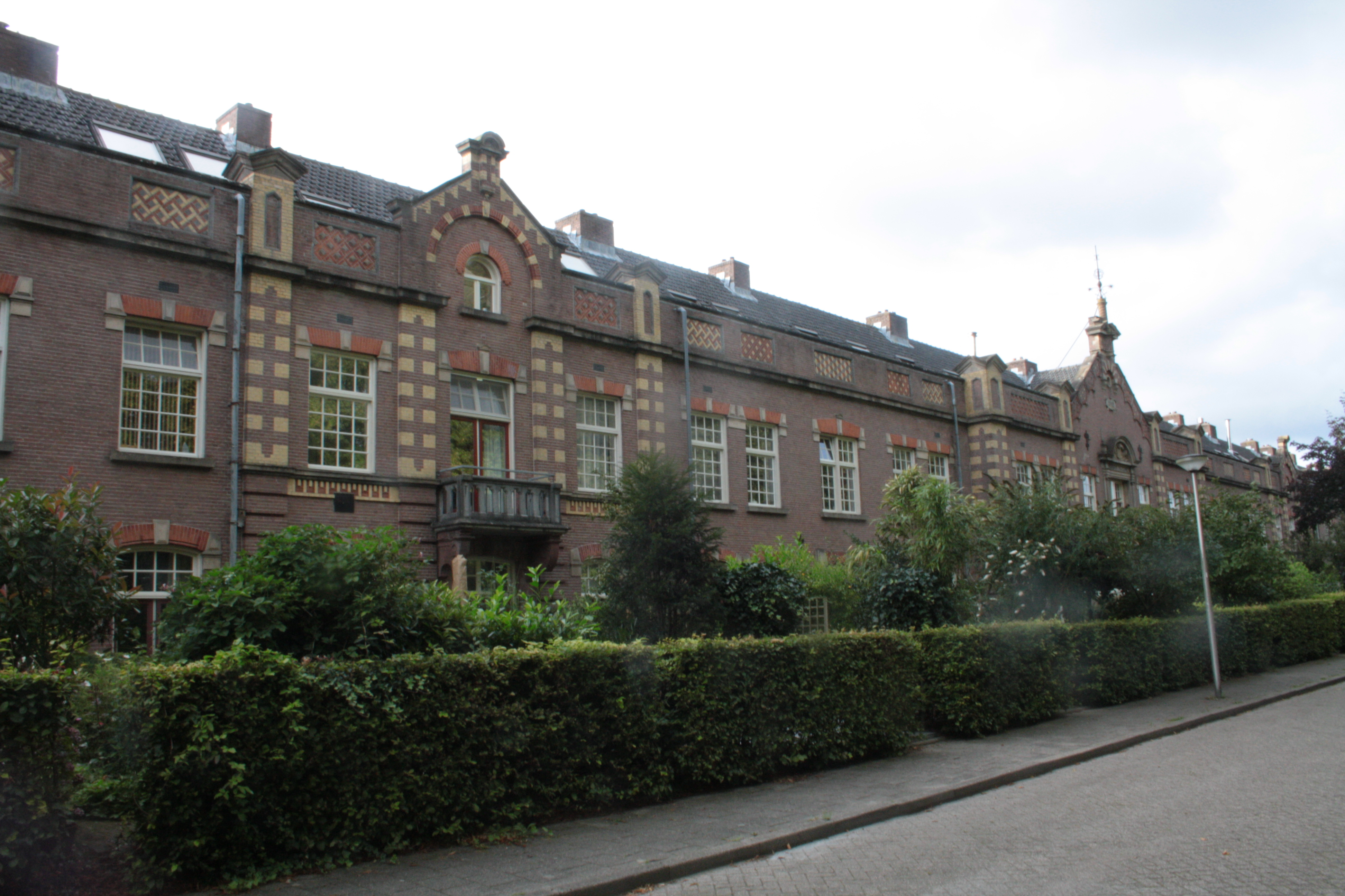 Lodewijkkazerne op het voormalig Juliana van Stolbergterrein.